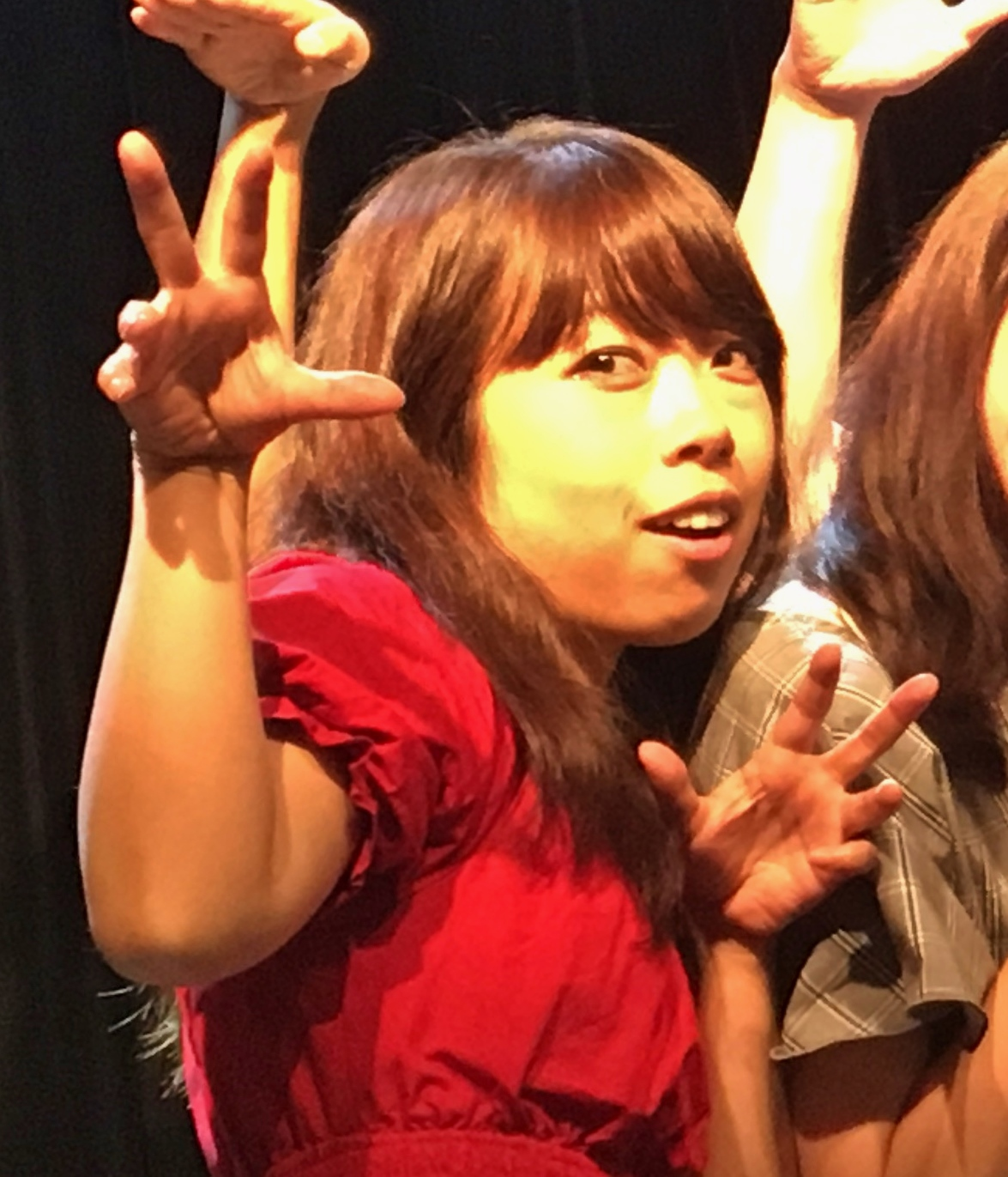 広江美奈（2018年8月8日、LOFT9 Shibuya）